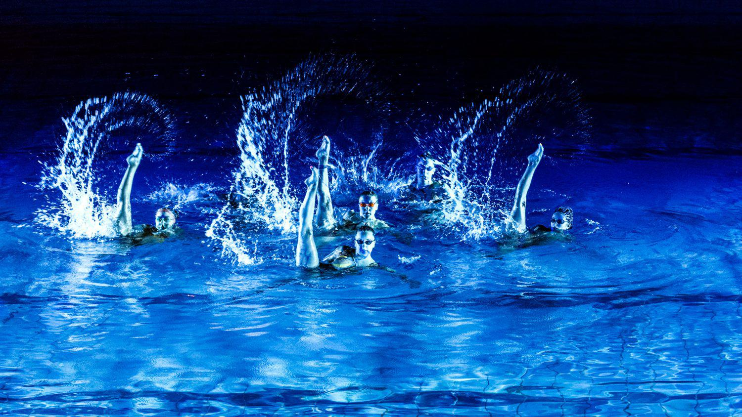 La piscina del Centro Deportivo Municipal Palomeras, en el distrito de Puente de Vallecas, se convirtió ayer en el escenario de un singular espectáculo que une la danza con la natación sincronizada y la ciencia ficción, incluido dentro de la programación de Veranos de la Villa y producido por este festival.